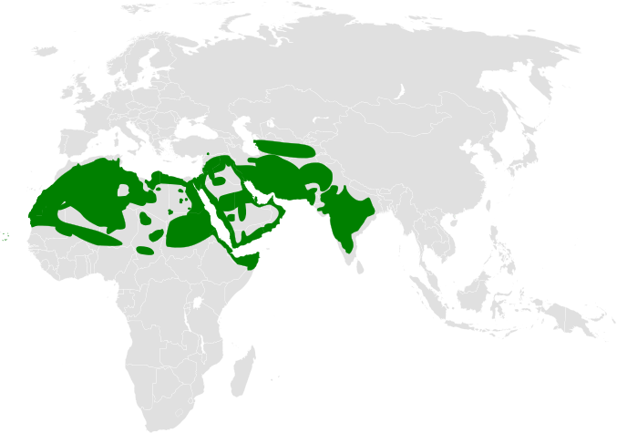 Ammomanes distribution map